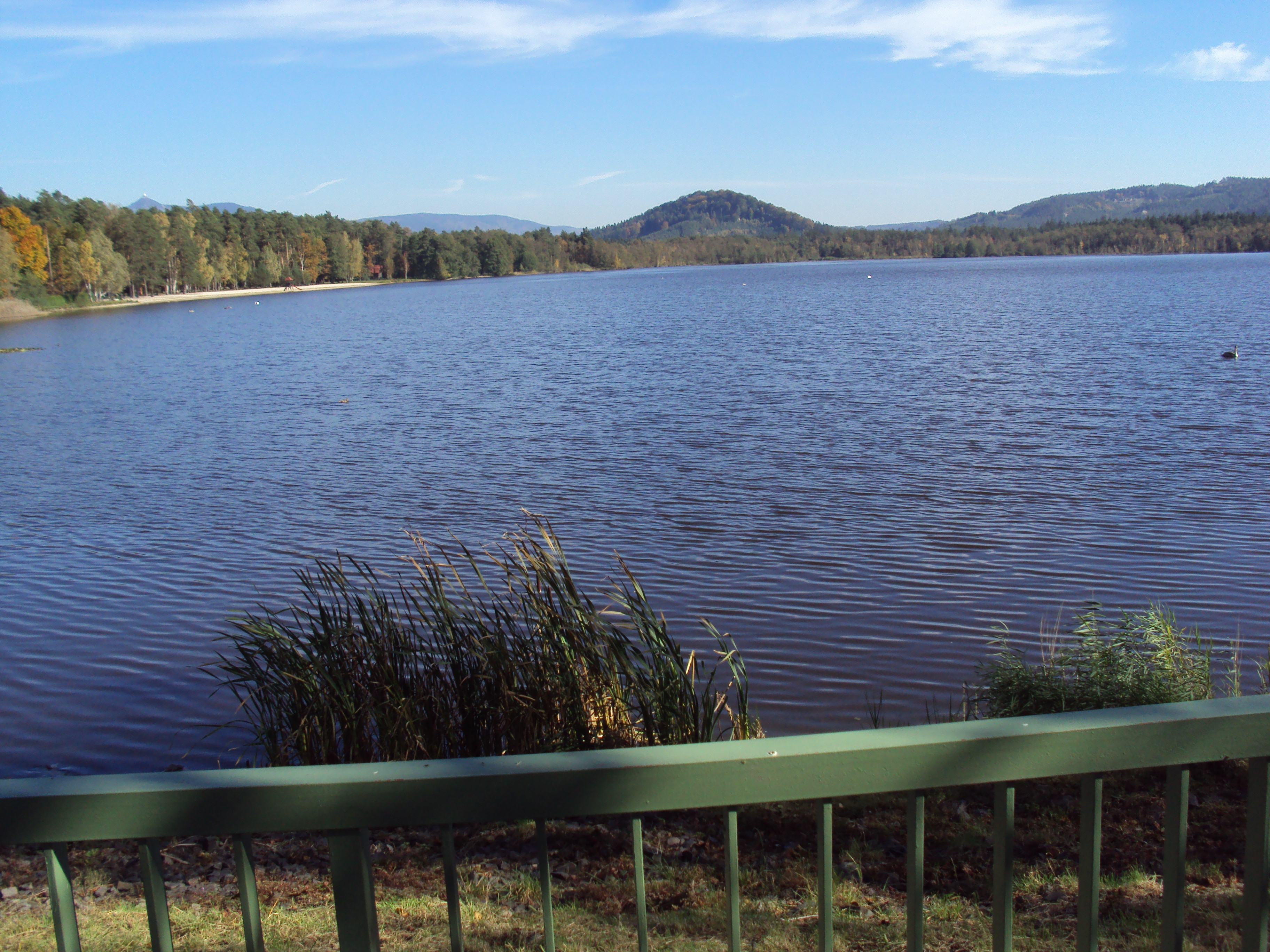 Hamerský rybník v obci Hamr na Jezeře, v pozadí Chrastenský vrch